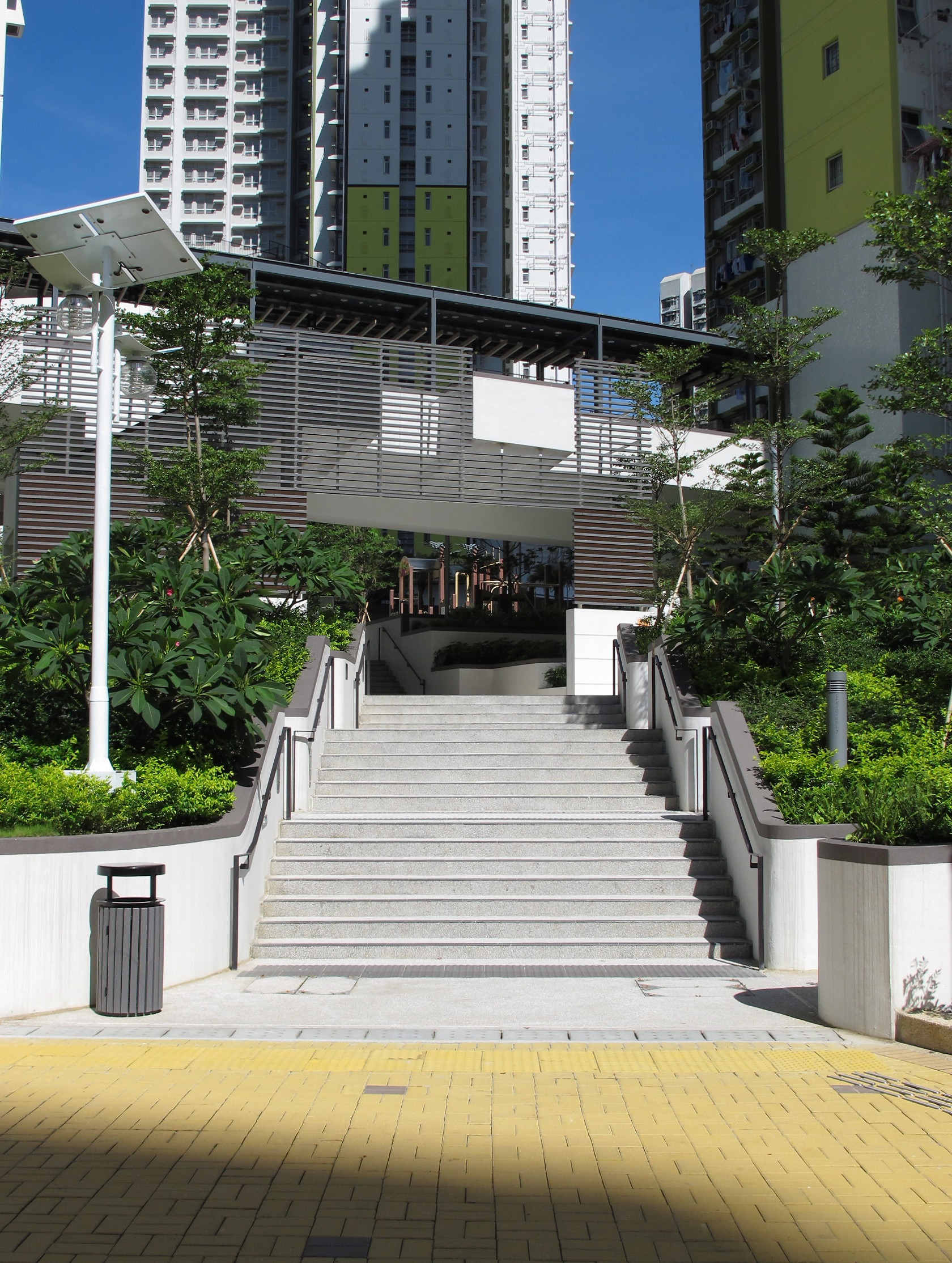 Choi Fook Estate 彩福邨